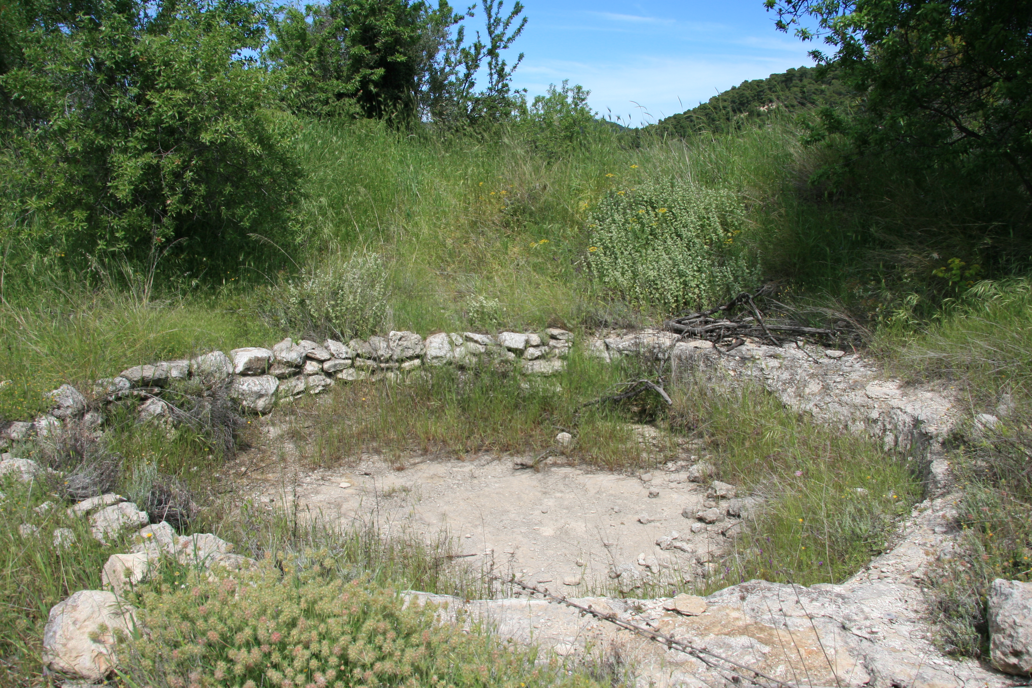 Ο Πρωτοελλαδικός οικισμός στο Προσκυνά Φθιώτιδας